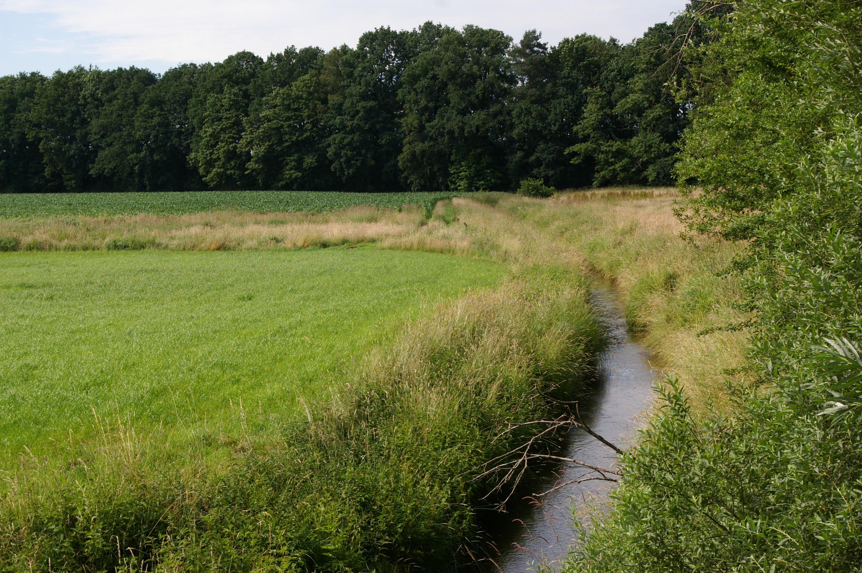 Der Eschbach bei Maasen